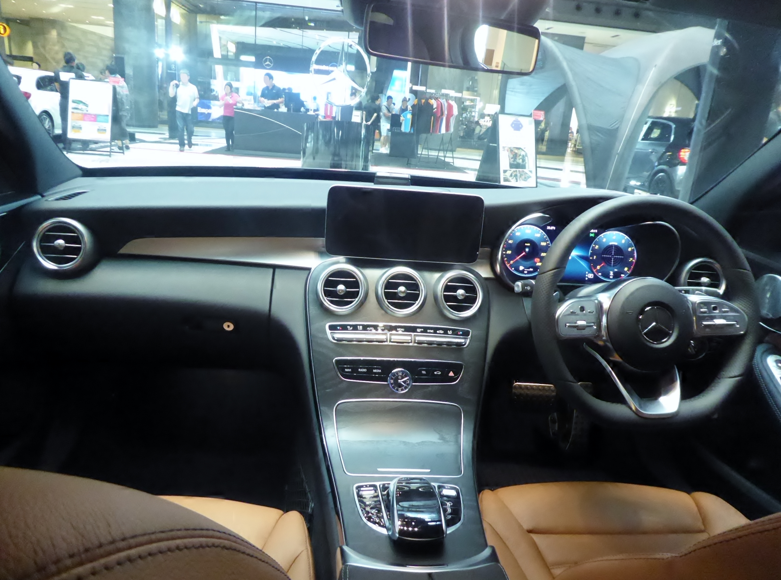 W205系メルセデス・ベンツ・C200 4MATIC AVANTGARDEのインテリアを撮影。